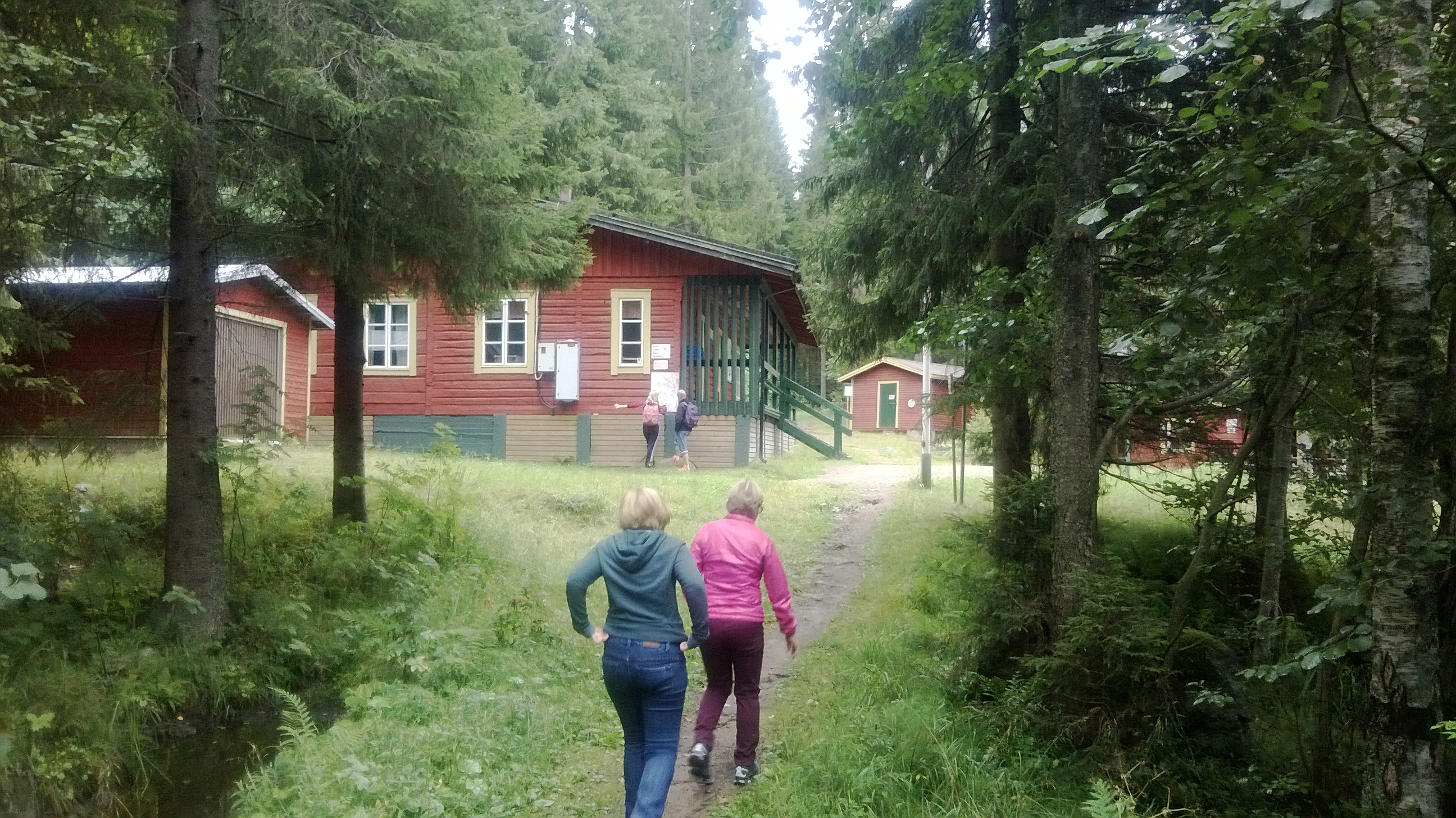 Ulkoilijoita Taka-Keljossa Jyväskylän Ladun majalla